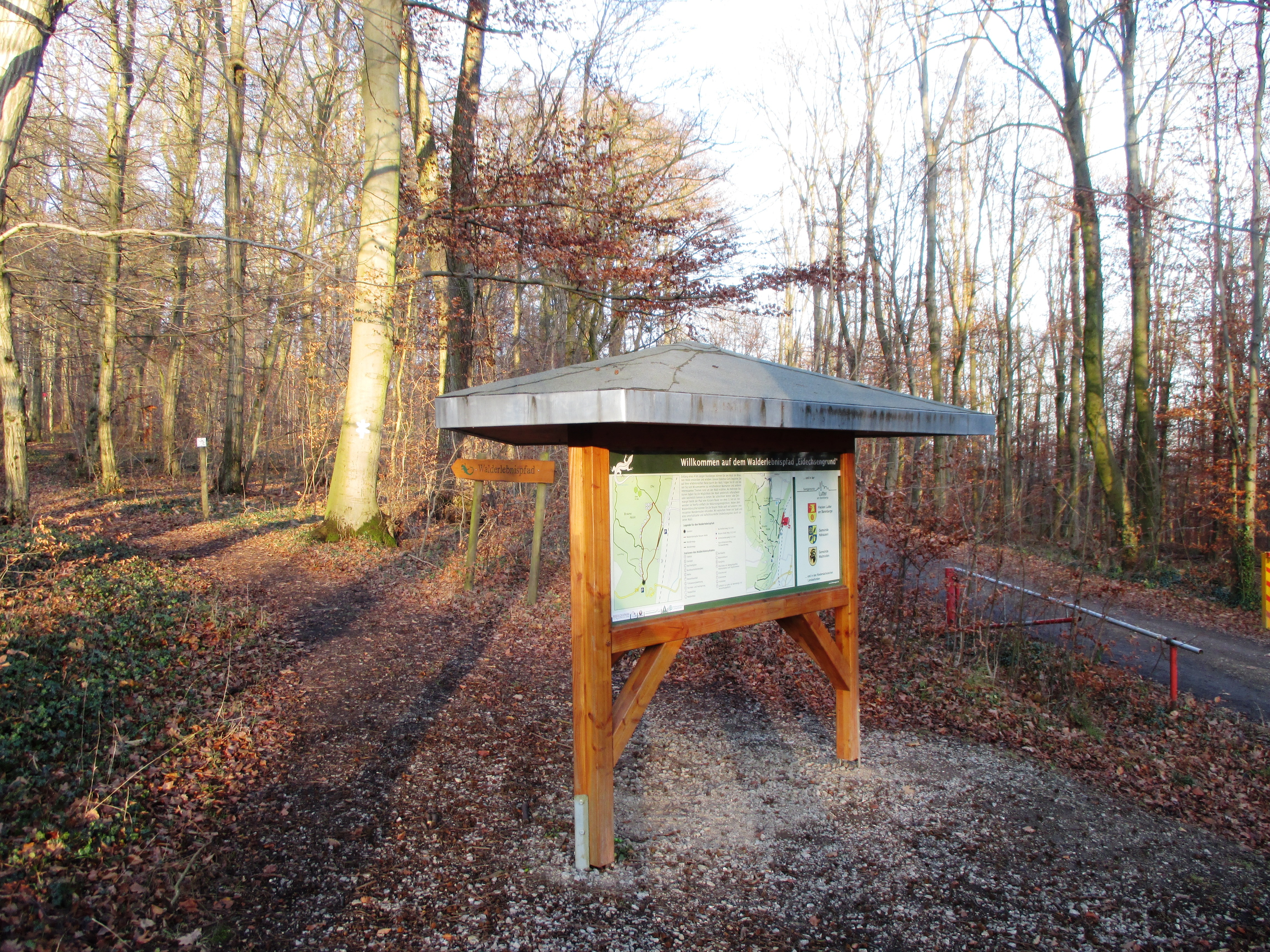 Beginn des Walderlebnispfads Eidechsengrund bei Nauen, Flecken Lutter am Barenberge